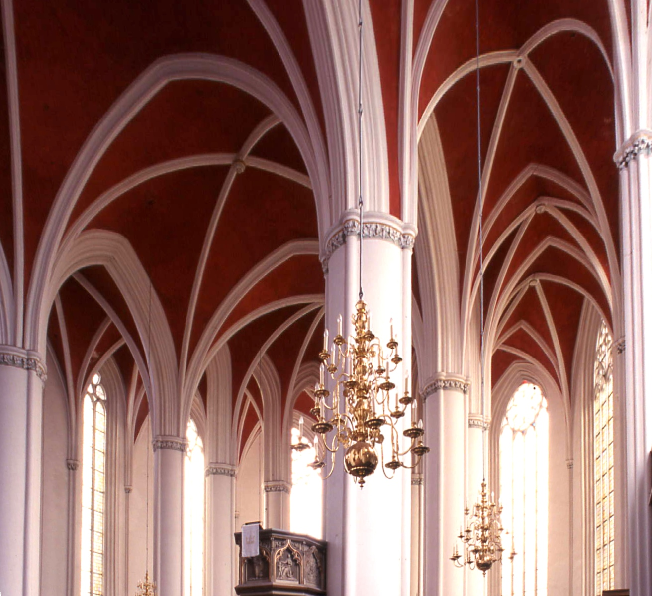 Verden an der Aller, Dom. Chor. Eigenes Photo, März 2003.